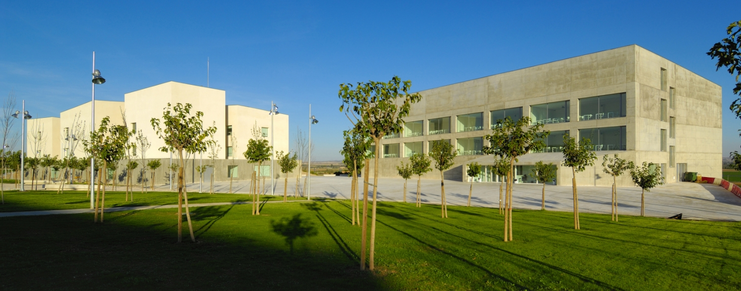 Campus de Villanueva de Gallego, Zaragoza